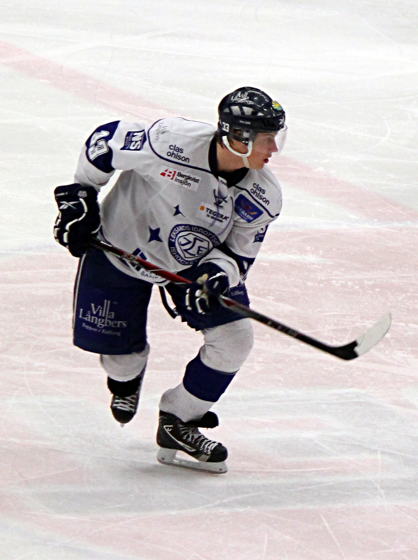 David Åslin för Leksands IF mot VIK Västerås HK 29 januari 2011.